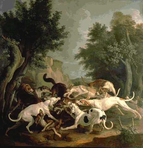 The petite bit de johann pelatre